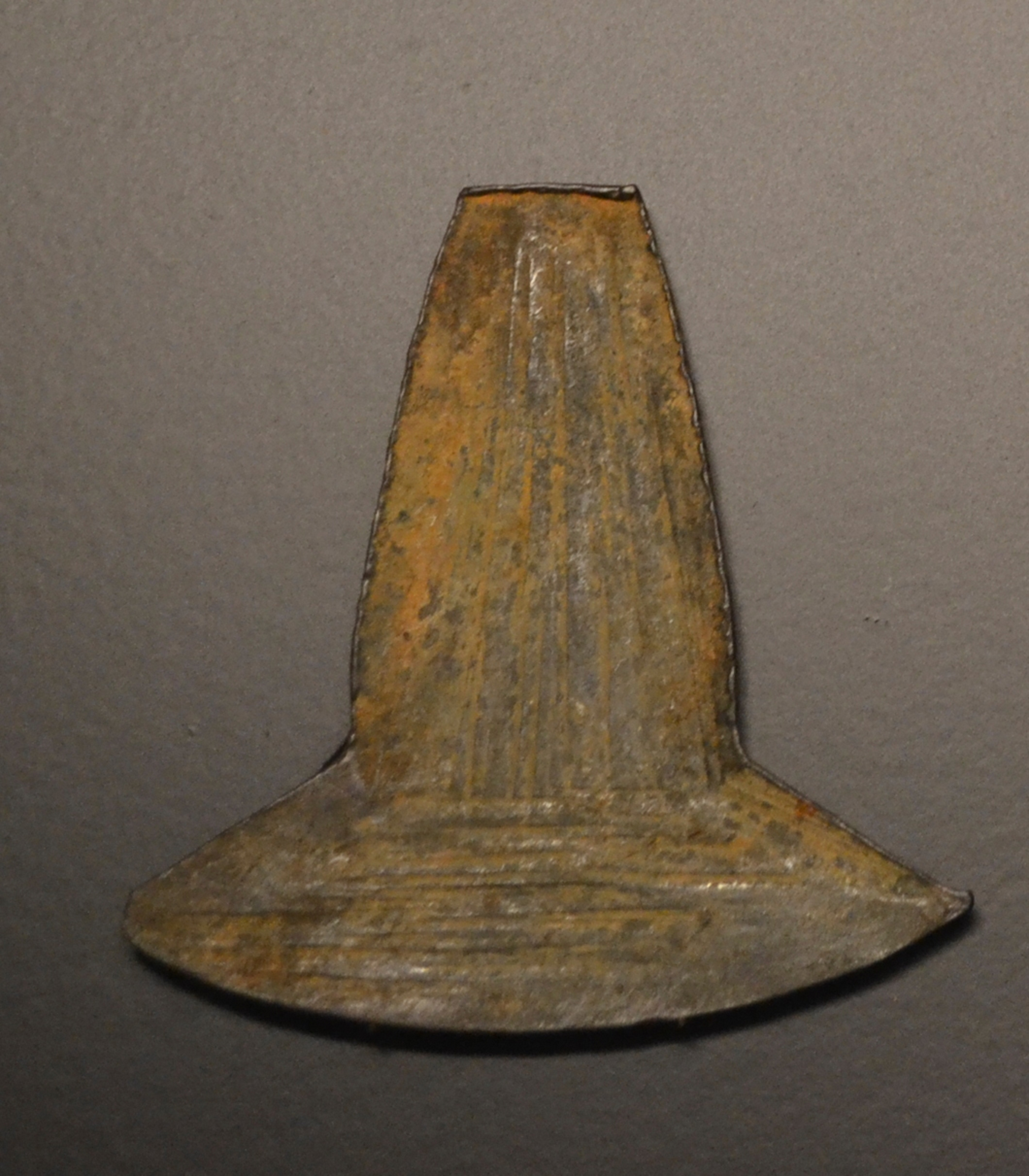 Dinero hacha de Ecuador (siglos X-XIV). Museo de Prehistoria de Valencia.